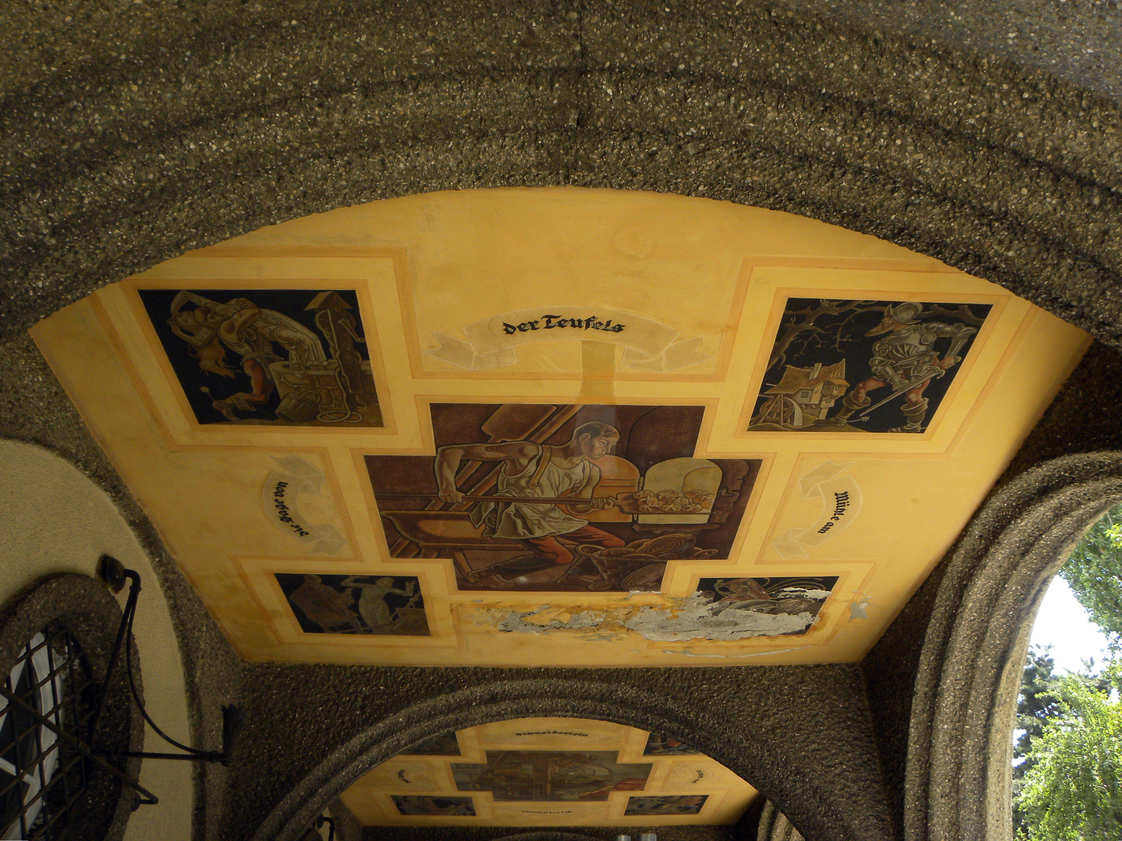 Kommunaler Wohnbau, Vogelweidhof, sogenannter Märchenhof - Die Szenen aus Märchen und Wiener Sagen darstellenden Deckengemälde wurden 1927/28 von Franz Wacik gemalt.